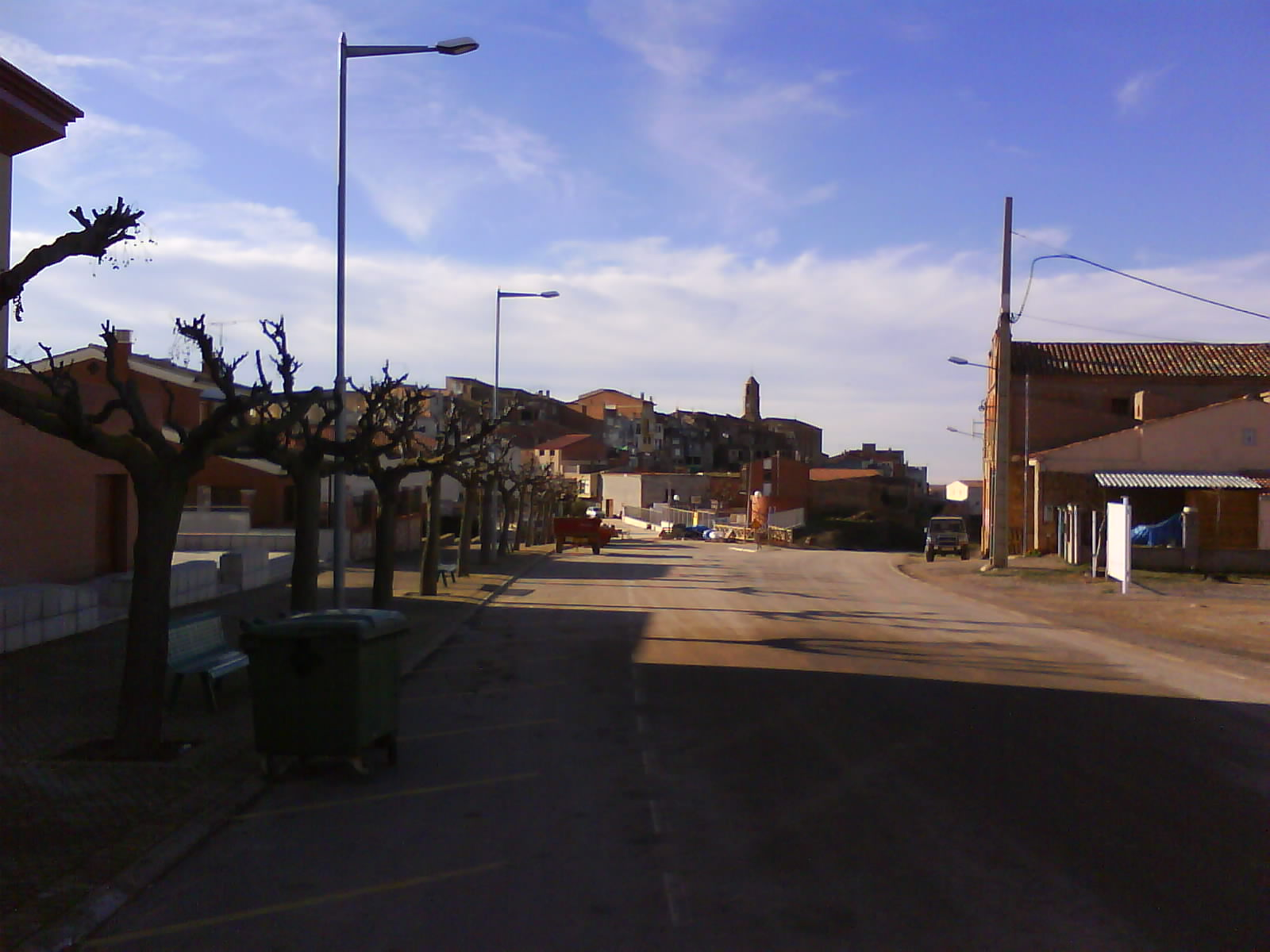 Vista del poble de Bellaguarda